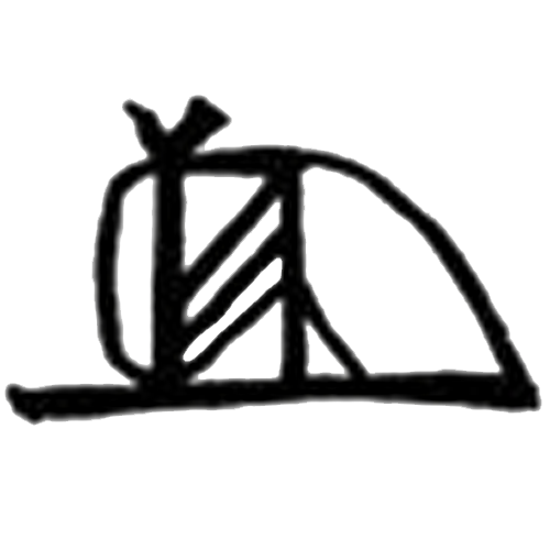 Ashikaga Ujimitsu's monogram